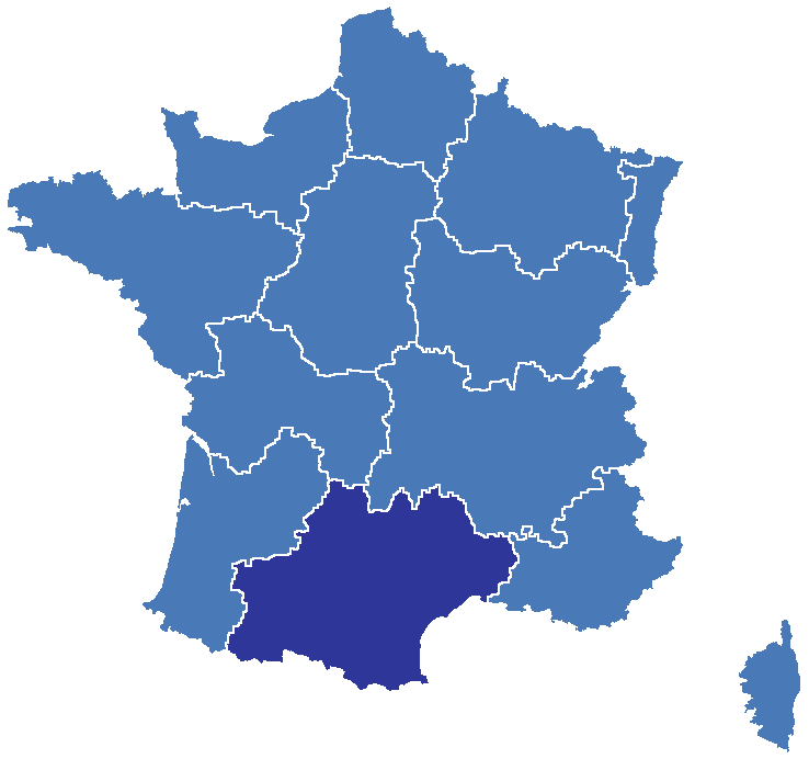 Self made France 3 Sud region map.